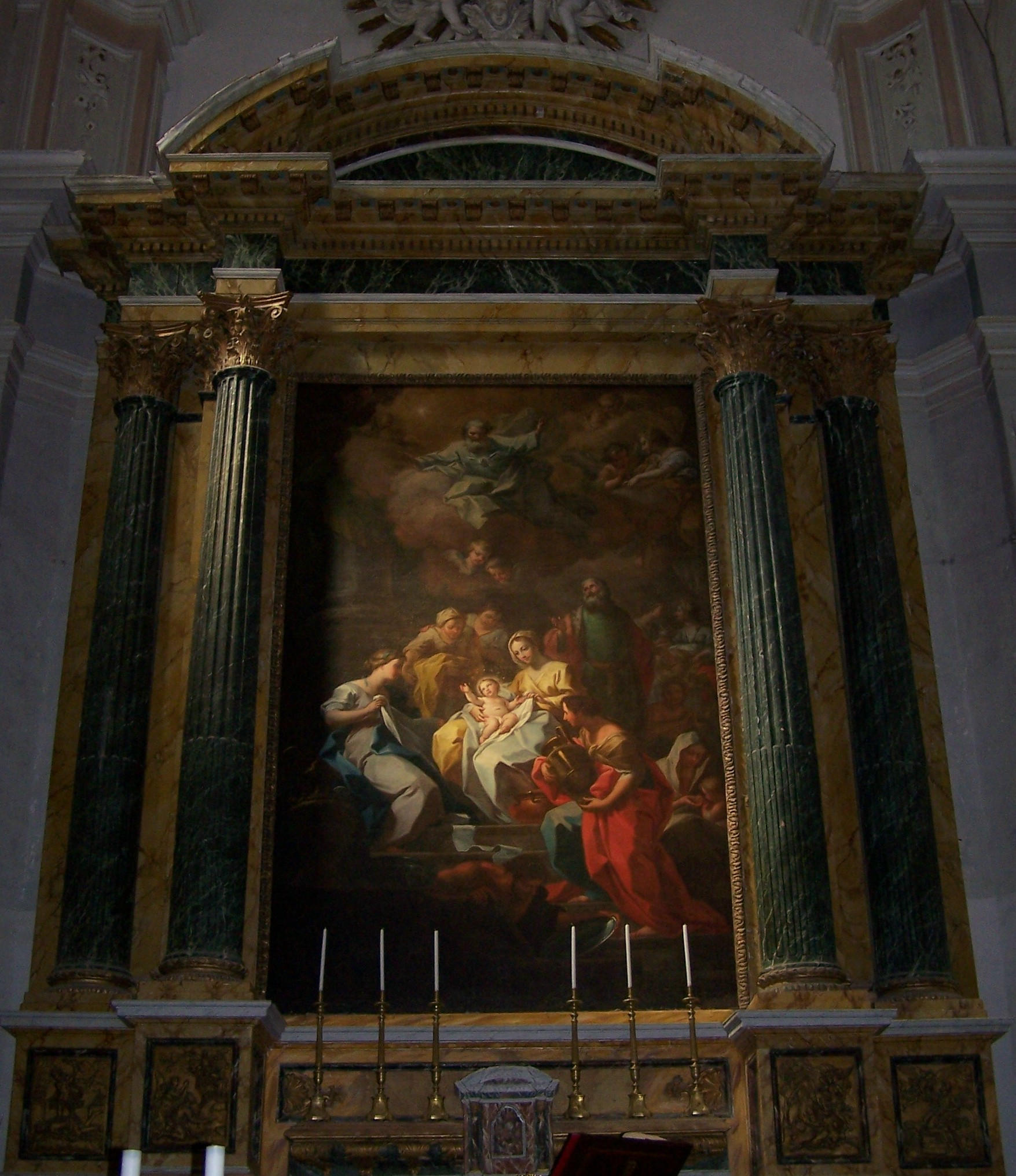 Chiesa S. Maria della Stella. Olivio Sozzi, Natività di Maria (1760 ca.). Militello